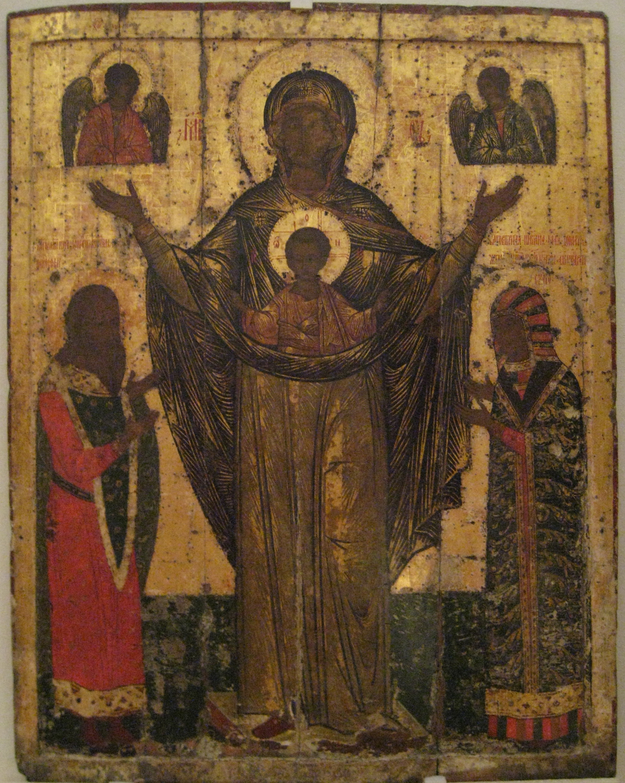 Our lady of Mirozh with pskov prince S. Dovmont and his wife S.Maria. Pskov museum. Список с чудотворной иконы Мирожской божьей матери, хранящейся в Мирожском монастыре. Псковский музей. Богоматерь на этой святой иконе изображена во весь рост стоящею с воздетыми руками и с предстоящими Ей святыми князьями Довмонтом Псковским и его супругой Марией Дмитриевной, начертанными на иконе уже после ее явления; празднование в честь ее совершается 24 сентября. БОГОМАТЕРЬ ВЕЛИКАЯ ПАНАГИЯ (МИРОЖСКАЯ ОРАНТА). 1583 (?) год. Псков. Дерево; темпера. 144 x 112 x 3. Поступила в 1926 (?) году из церкви св. Стефана Мирожского монастыря. Происходит из Спасо-Преображенского собора Мирожского монастыря во Пскове. Реставрирована в 1956 году в ГЭ Ф.А. Калинкиным; в 1957 и 1961 годах в ГЦХРМ И.М. Громовой, Е. Кристи, А. Лисицыной, С.В. Ямщиковым, В. Бажановым. ПГОМЗ. инв. 1727